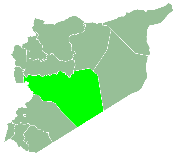 Suriye'de Humus.